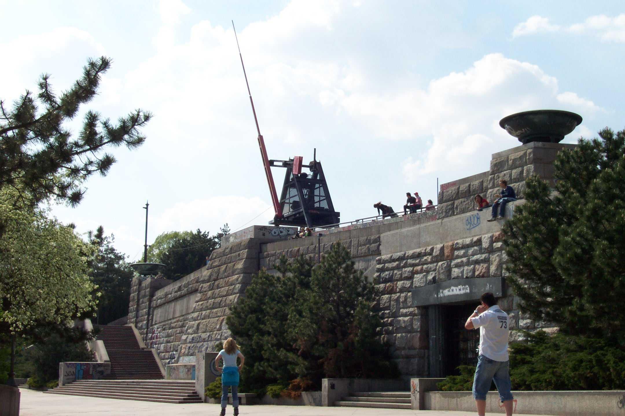 Metronome at Letná in Prague - Metronom na Letné v Praze